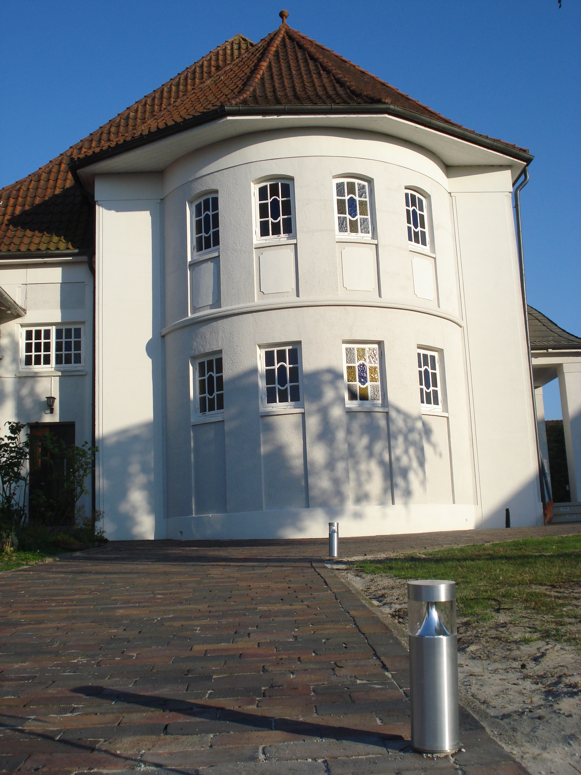 Friedenskirche, Gotteshaus der Baptistengemeinde Varel, erbaut 1922